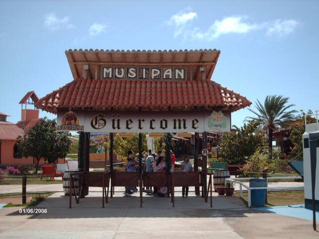 Entrada al parque temático Musipán El Reyno, Ubicado en la isla de Margarita, Venezuela